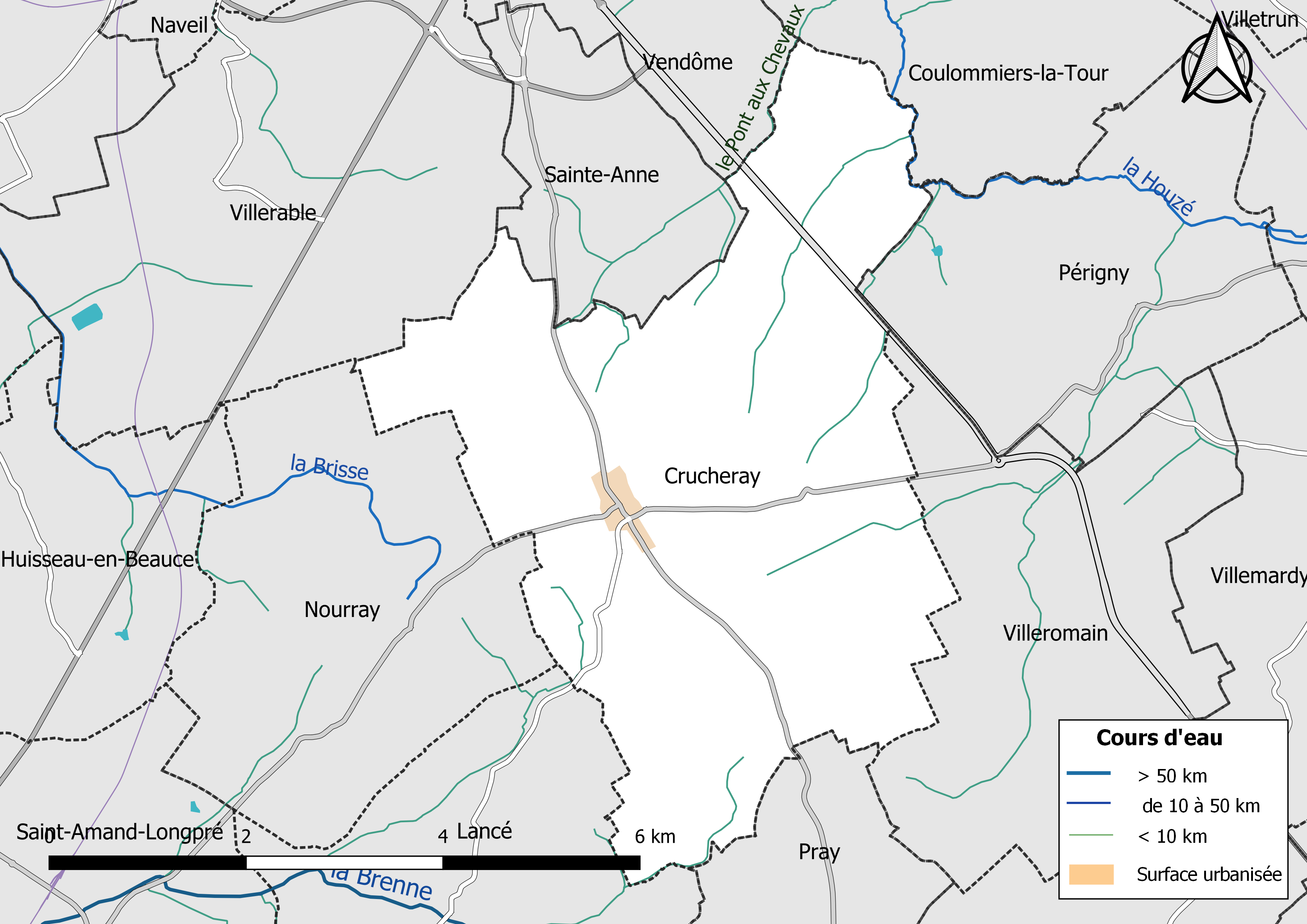 Carte du réseau hydrographique de la commune de Crucheray (Loir-et-Cher, France).